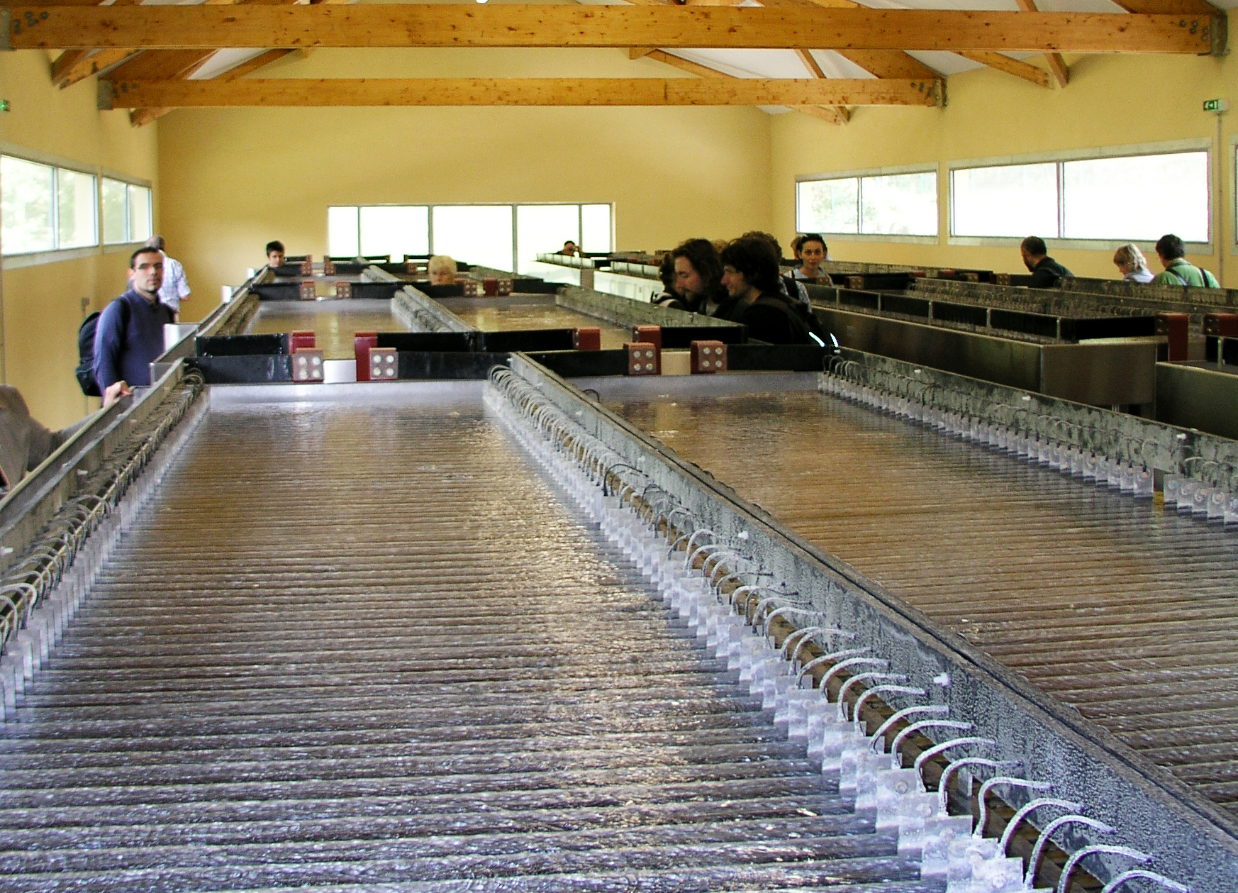 Station de décarbonatation du Blagour du Soulier (Chasteaux, Corrèze).